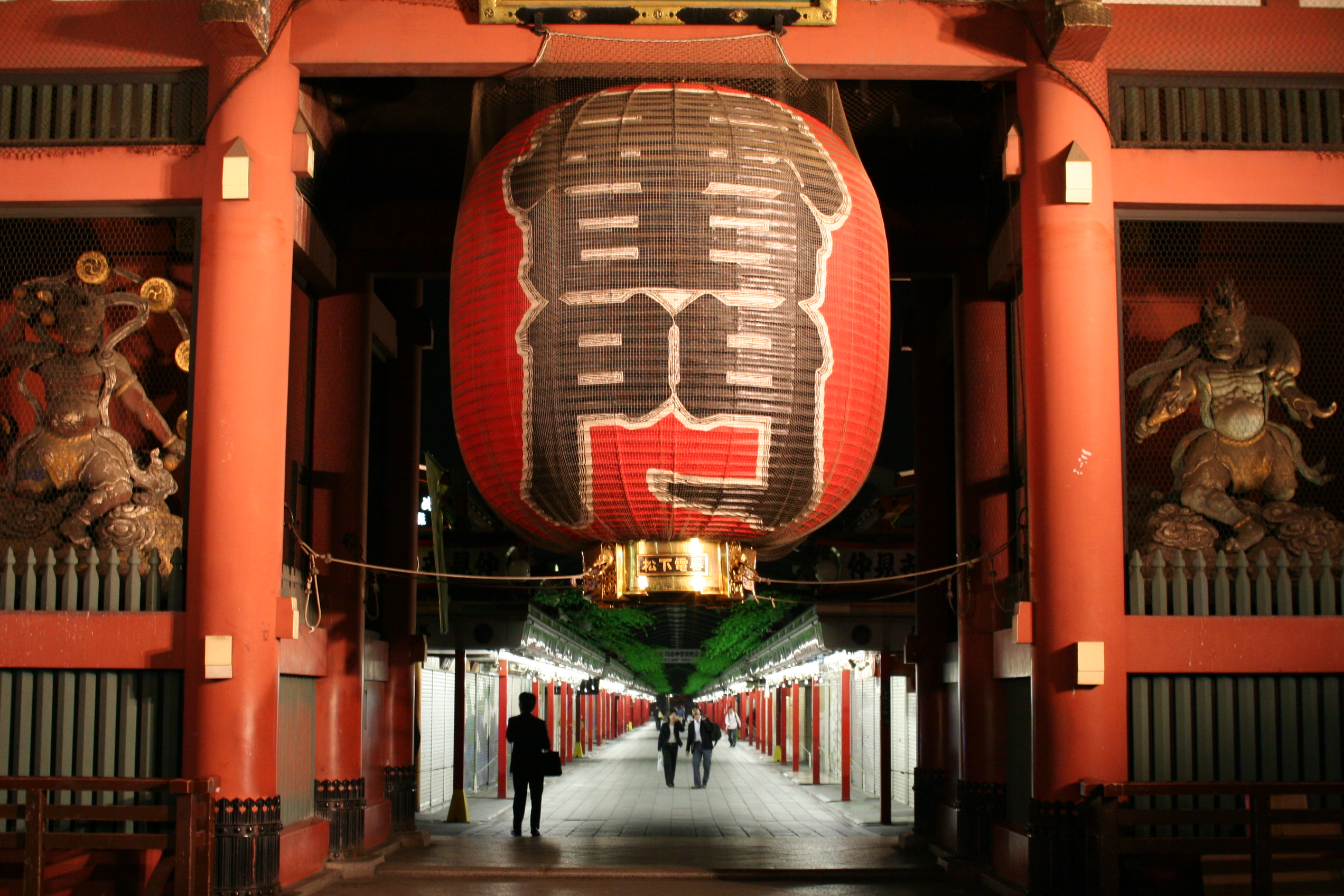 Japanese Famous Gate "雷門(Kaminari-mon)". A word "Kaminari-mon" means "Thunder(Kaminari) Gate(Mon)". At Buddhist temple Senso-ji, Asakusa, Tokyo, Japan. 東京浅草 浅草寺の雷門。